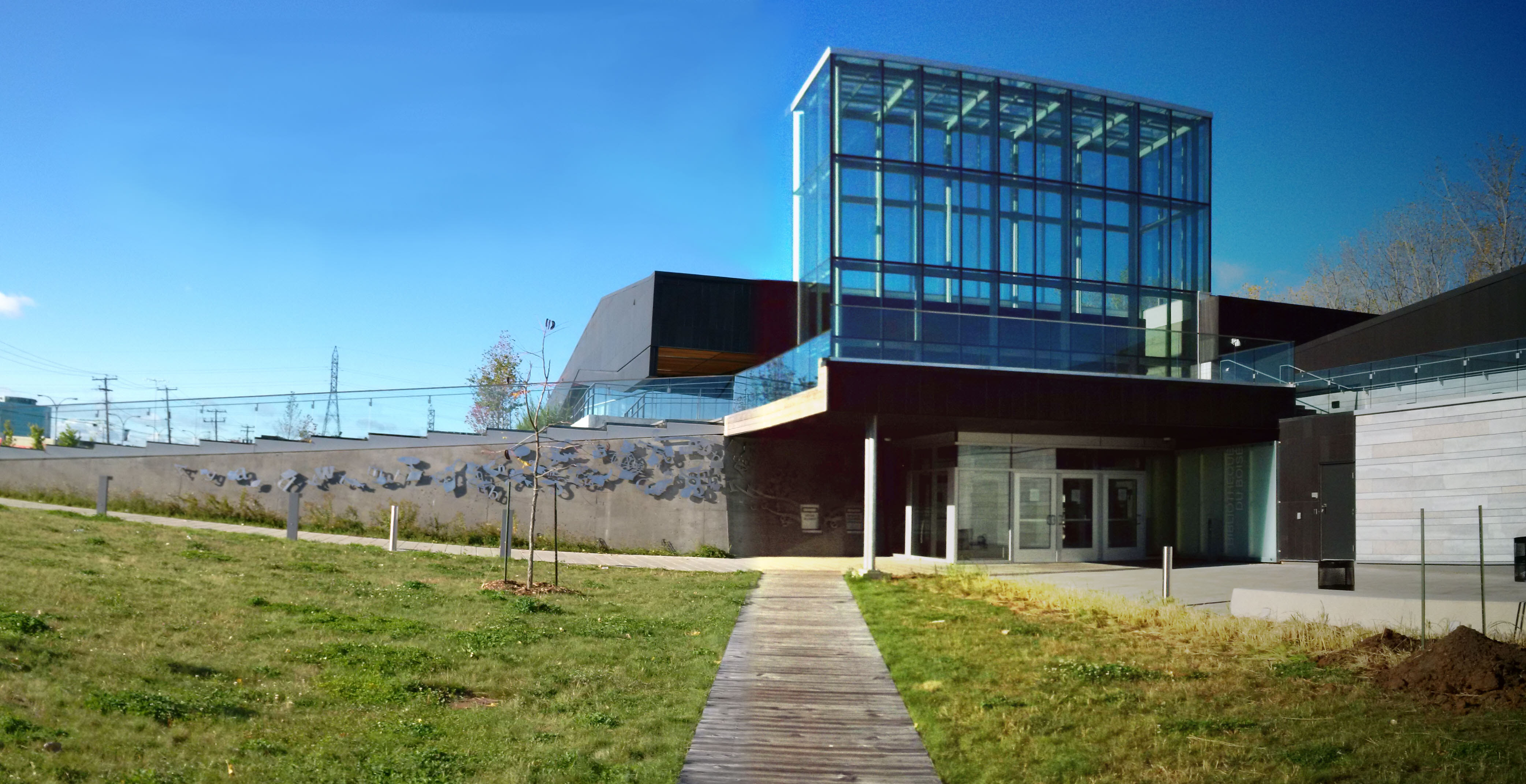 Fruit d’un concours d’architecture, la Bibliothèque du Boisé est à l’échelle humaine, plurielle, verte et ancrée dans le 21e siècle. Le bâtiment multifonction de 6 000 m2 comprend une bibliothèque, un centre d’exposition et une réserve muséale. Elle intègre en outre plusieurs stratégies de conception durable, dont un système de géothermie répondant à 100 % des besoins en chauffage et en climatisation.